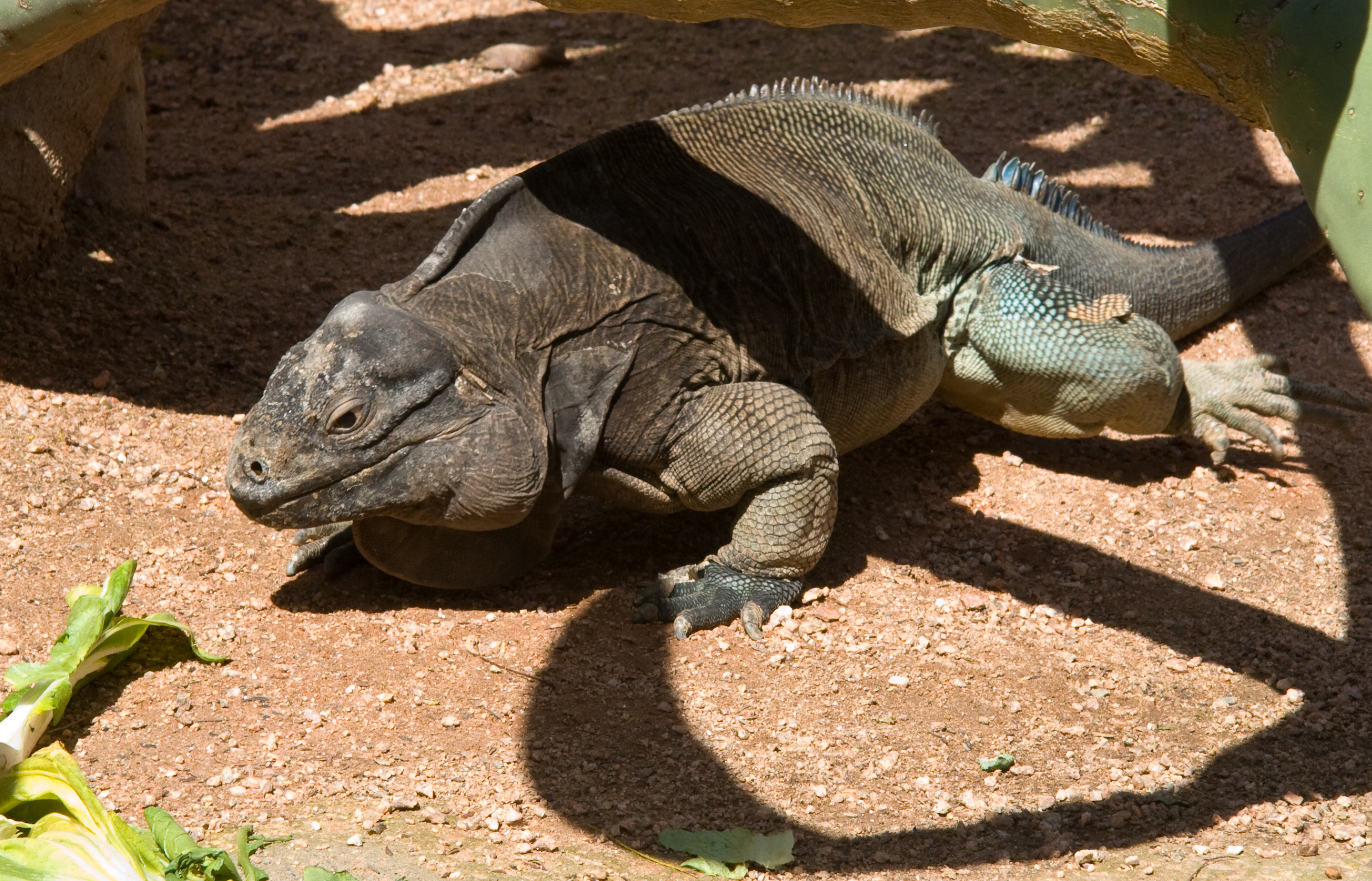 Anegada Ground Iguana (Cyclura pinguis) in San Diego Zoo